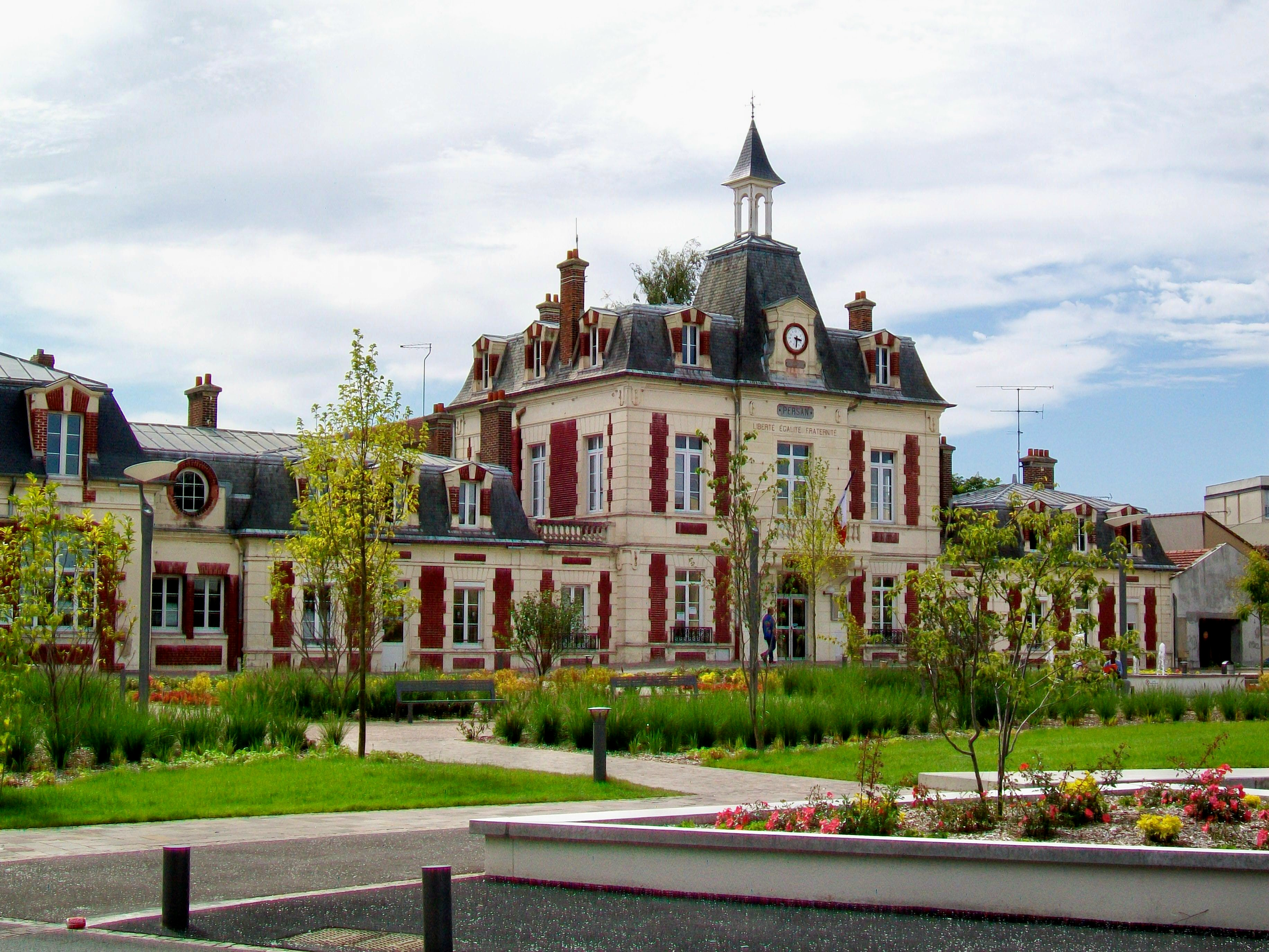 Persan, la mairie, avenue Gaston Vermeire.